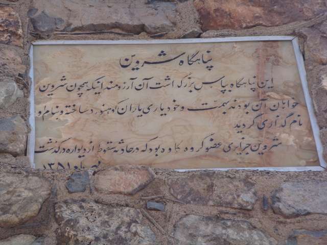 کتیبه‌ی نصب شده بر سردر جان‌پناه شروین